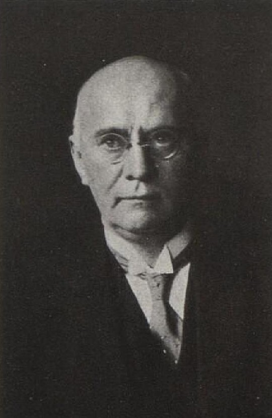 František Žákavec (1878-1937), český historik umění, profesor Univerzity Komenského v Bratislavě.